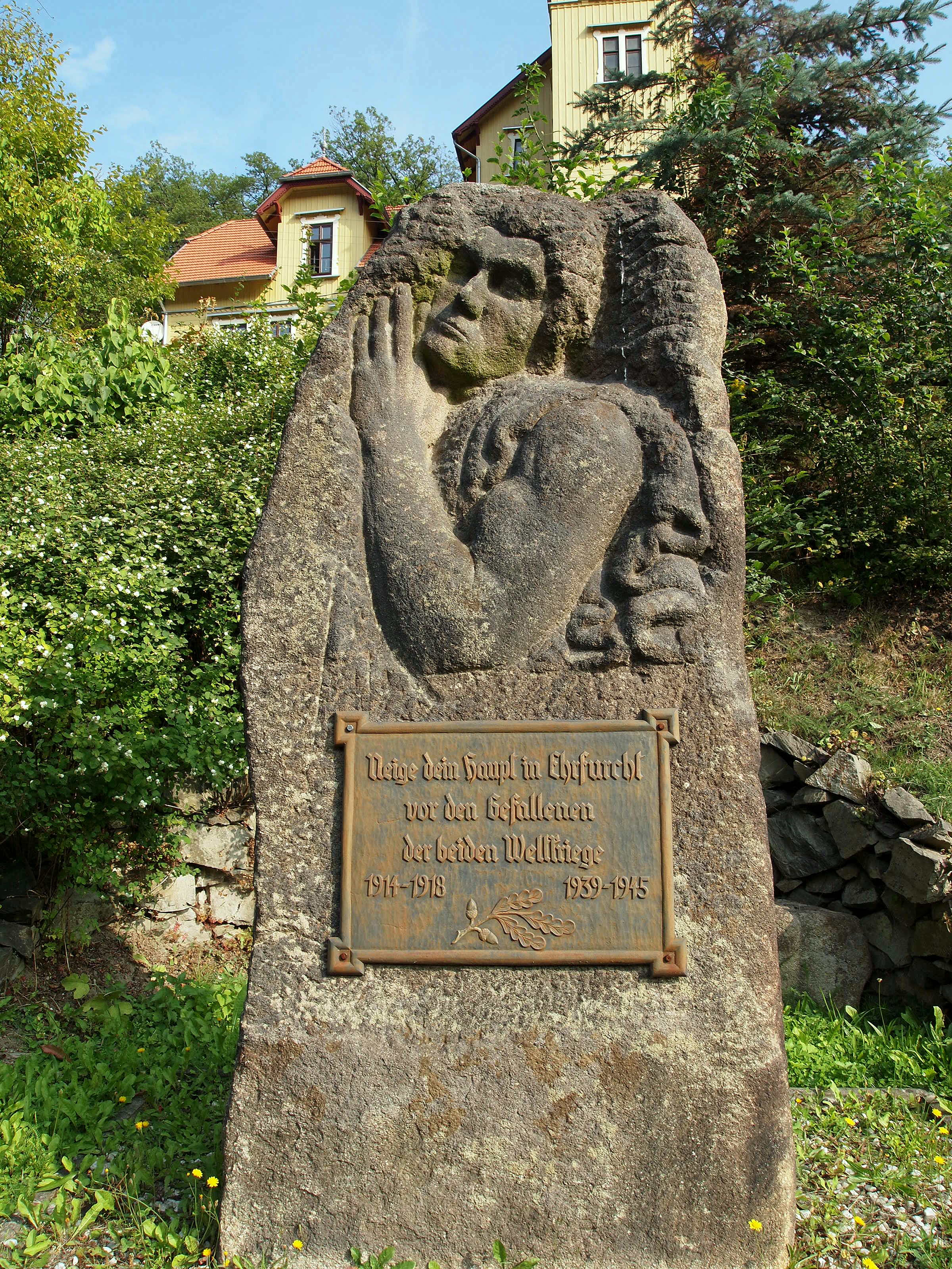 Altenbrak (Stadt Thale, Landkreis Harz; Sachsen-Anhalt), Kriegerdenkmal unterhalb der Kirche